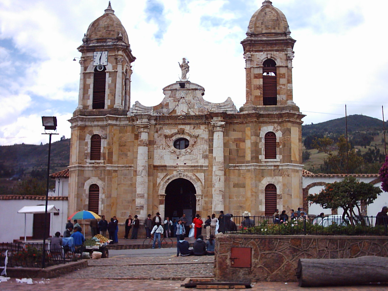 Iglesia de Tibasosa (Boyacá), Colombia